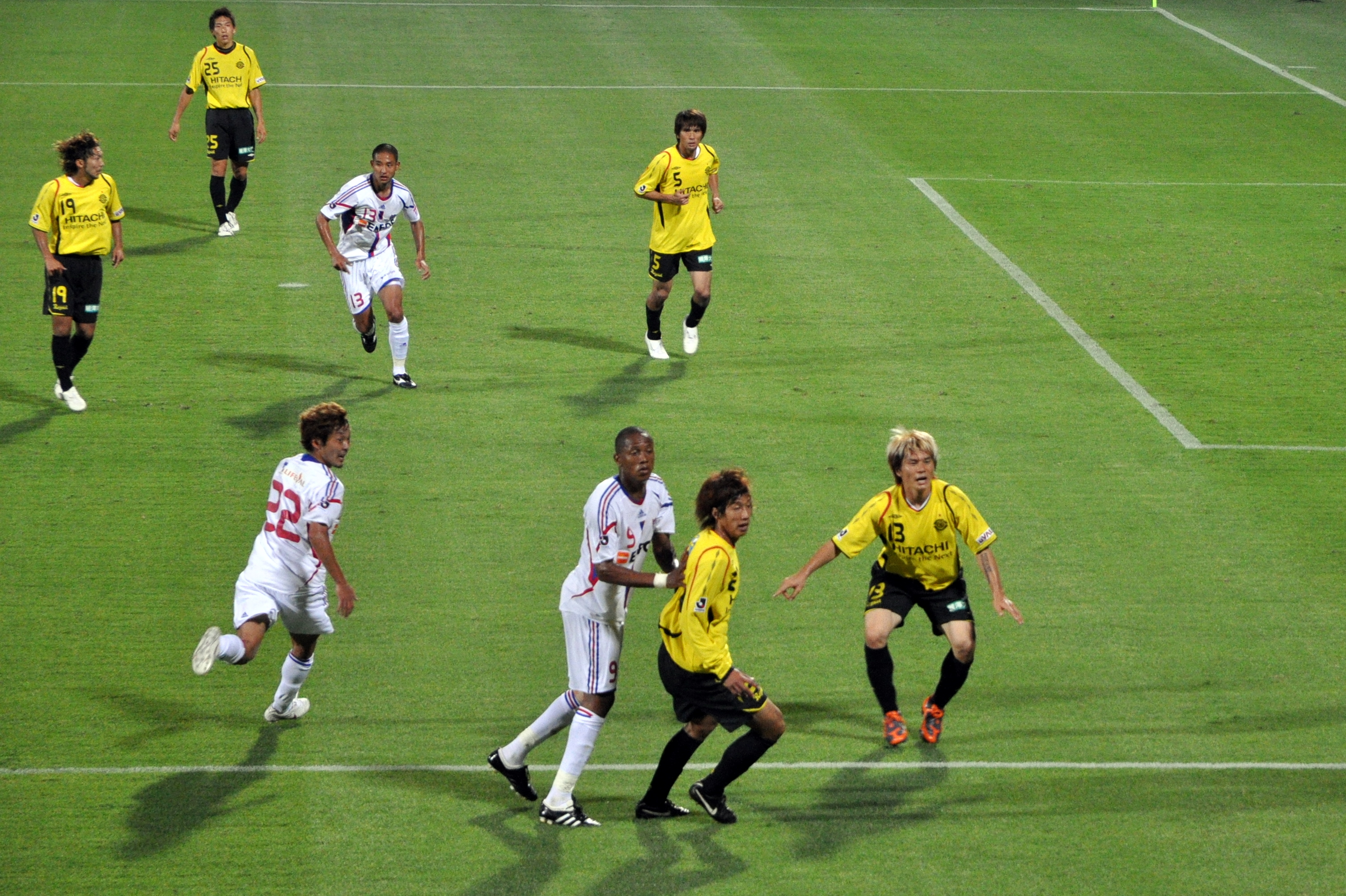 Kashiwa 0 - 3 Tokyo (Goals: Ishikawa, Cabore, Hirayama)